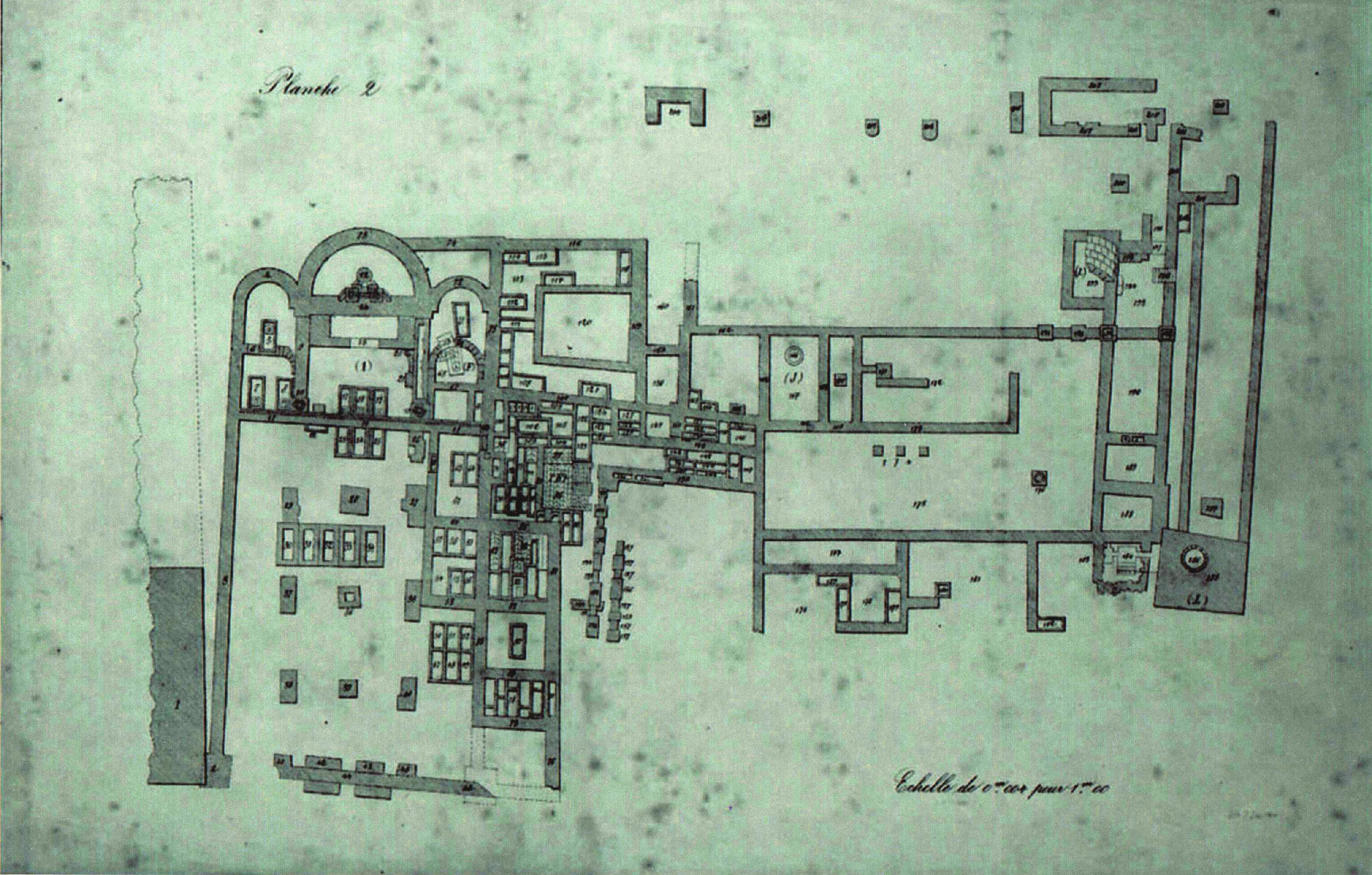 Plan de la Cathédrale du château reconstitué d'après les fouilles achéologiques menées par Philippe Geny en 1875.